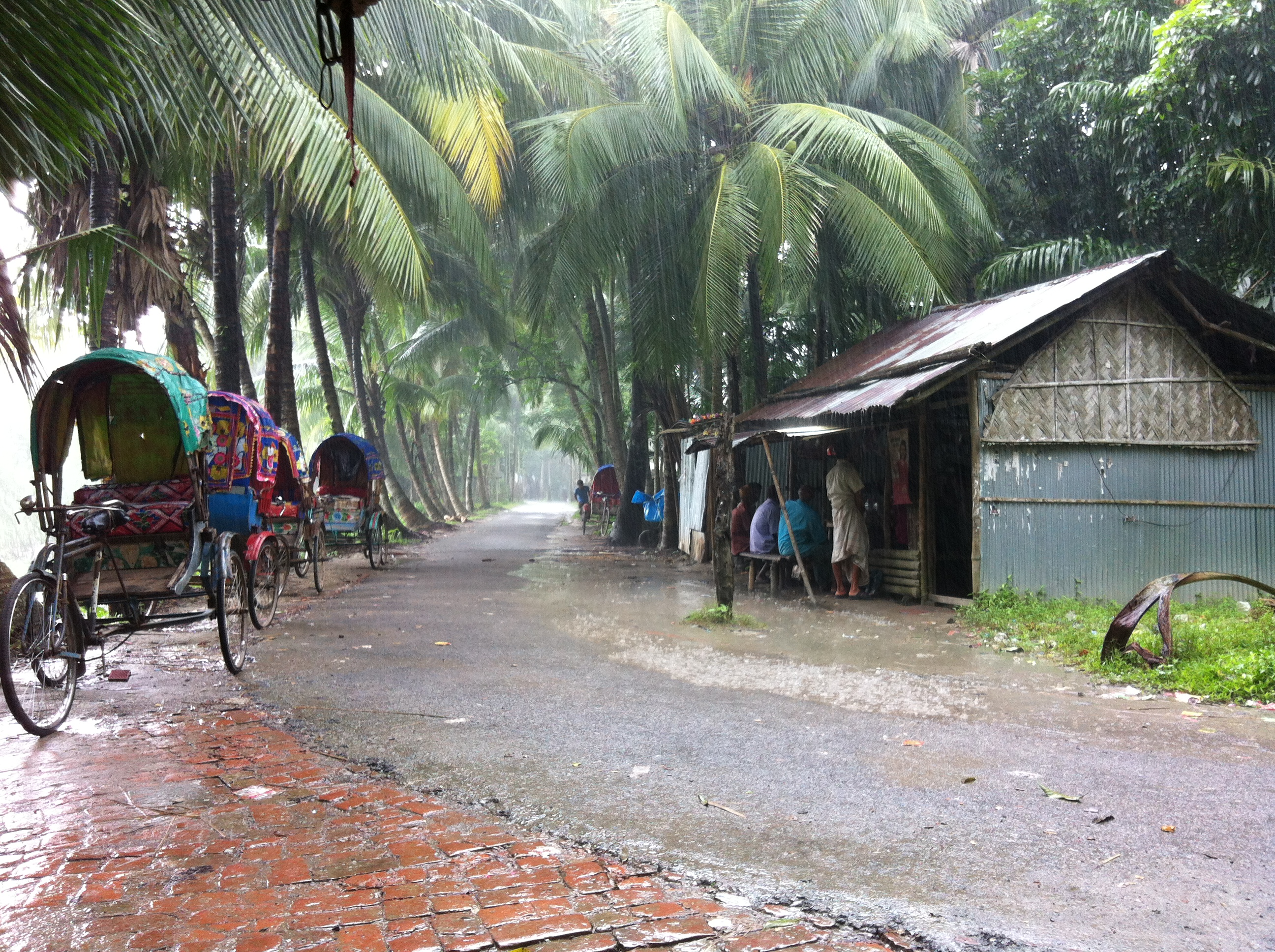 বিরাহিমপুর তালতলা মোড়